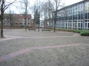 Der Serenaden Hof